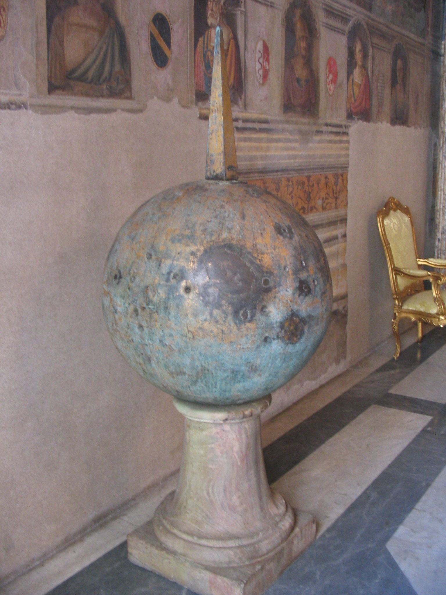 Antike Obeliskenspitze aus den MUSEI CAPITOLINI in Rom; Capitoline Museums Native nameMusei CapitoliniLocationRome, ItalyCoordinates41° 53′ 35″ N, 12° 28′ 57″ E Established1471Web pagemuseicapitolini.orgAuthority control : Q333906 VIAF: 171285001 ISNI: 0000 0001 2117 0496 LCCN: n79126898 GND: 1214261-X SUDOC: 029890012 WorldCat institution QS:P195,Q333906